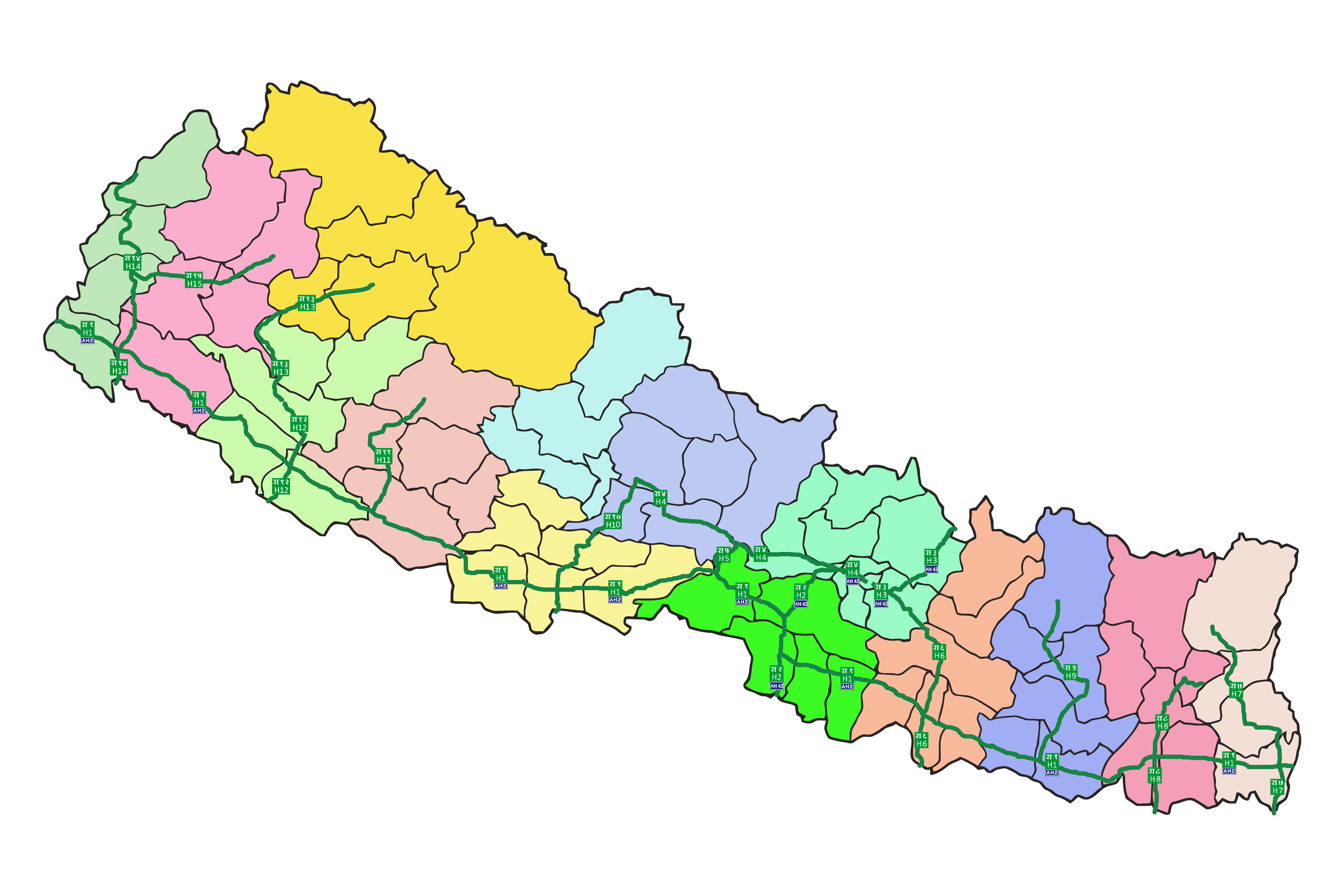 نقشه راههای ملی نپال